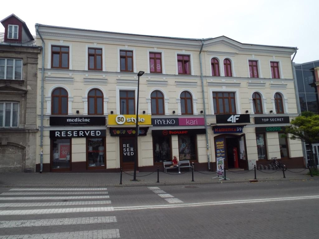 Інтереси холмщаків та православної церкви відстоював єдиний український адвокат доктор Степан Баран, який відкрив адвокатську канцелярію у Холмі на вул. Люблінській, 59.